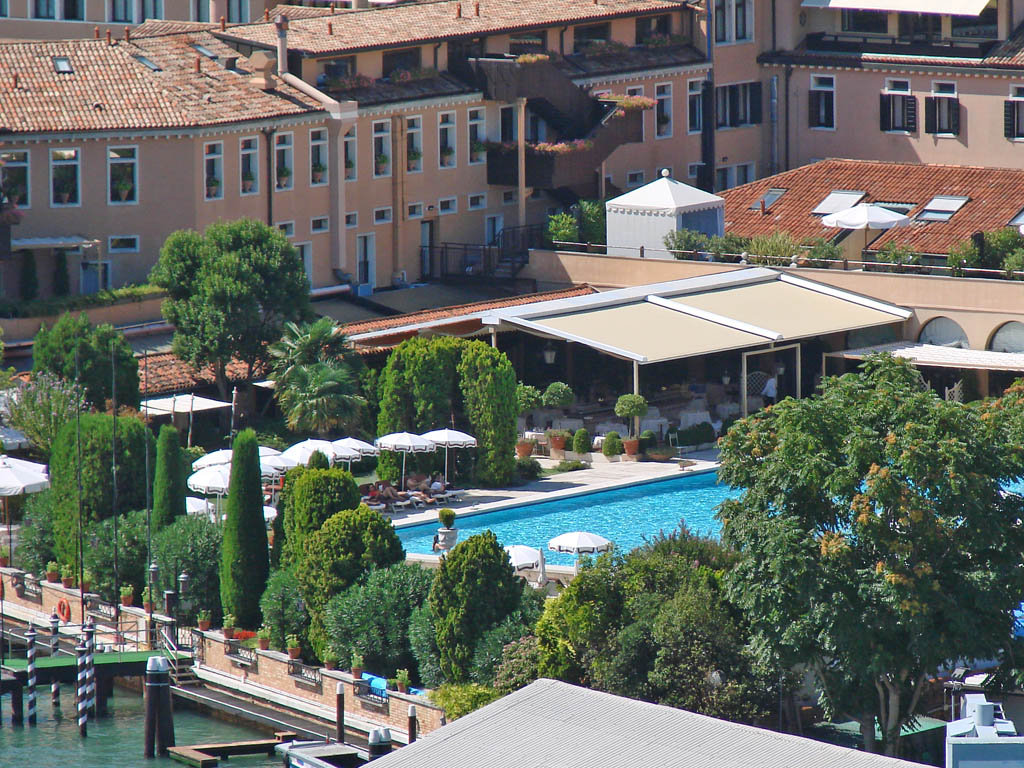 L'hôtel Cipriani se trouve sur l'île de la Giudecca ; ce palace dispose d'une piscine d'eau de mer en plein air dont les dimensions excèdent celles d'un bassin olympique.